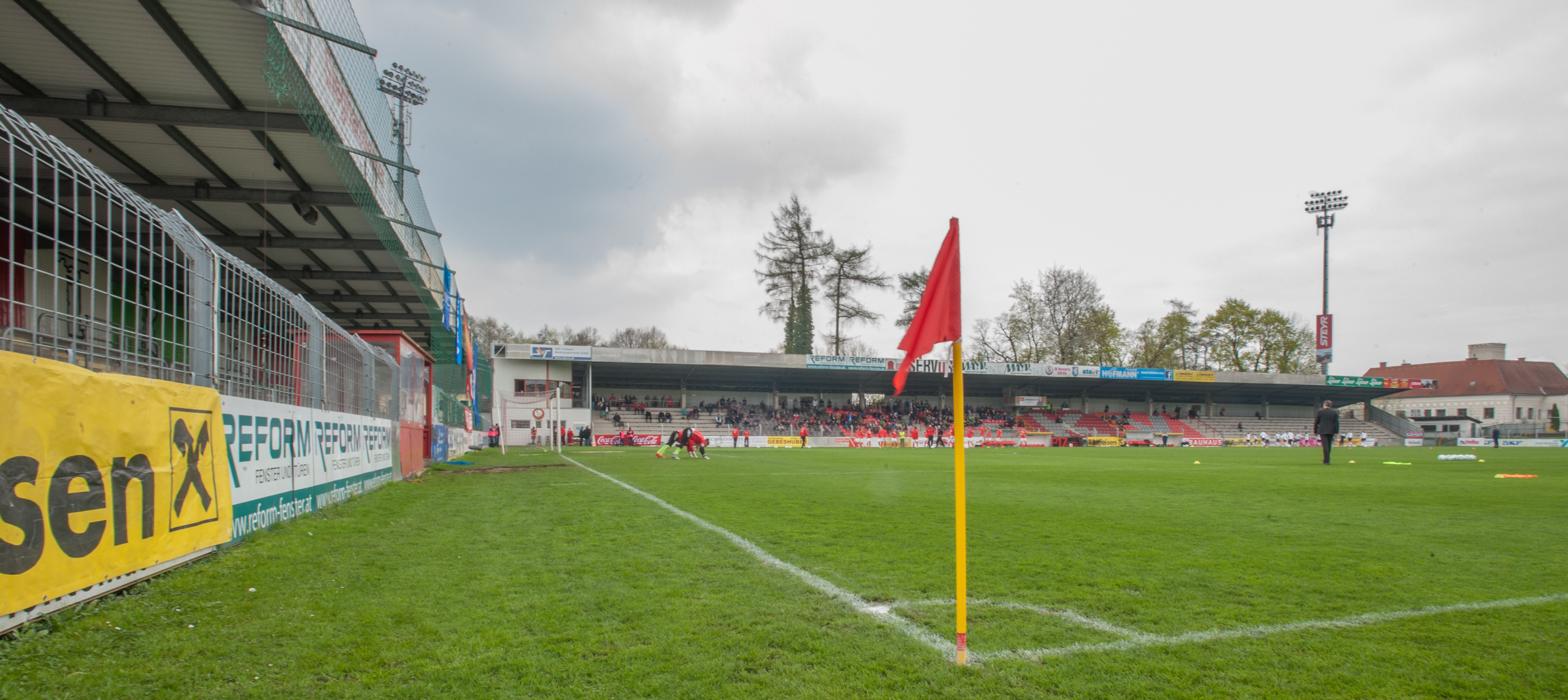 Steyr, Austria, 10.04.2016, ÖFB Frauen EM-Qualifikation - Österreich vs Norwegen. Bild zeigt Vorwärts-Stadion Steyr.